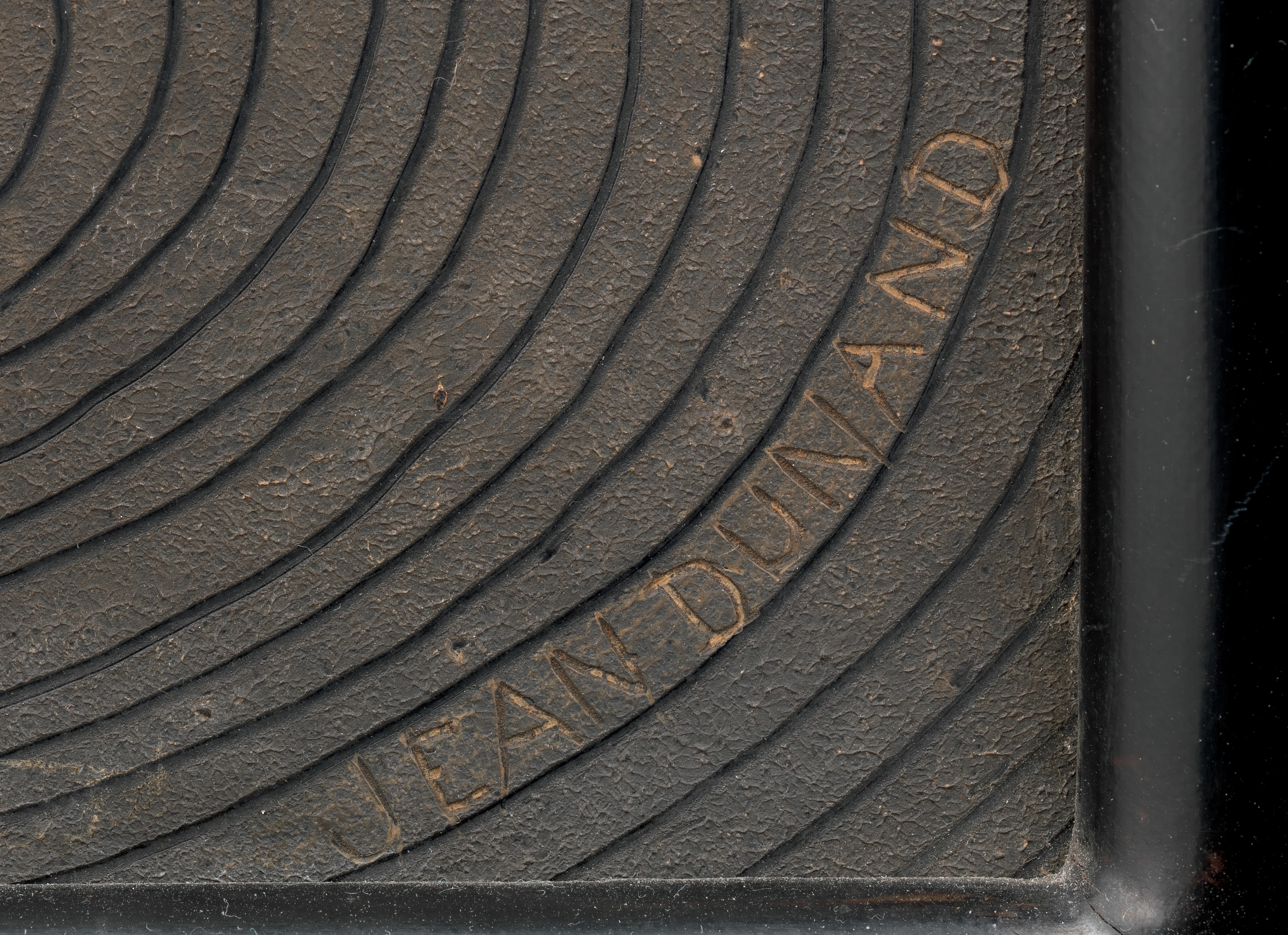 Panel; Furniture